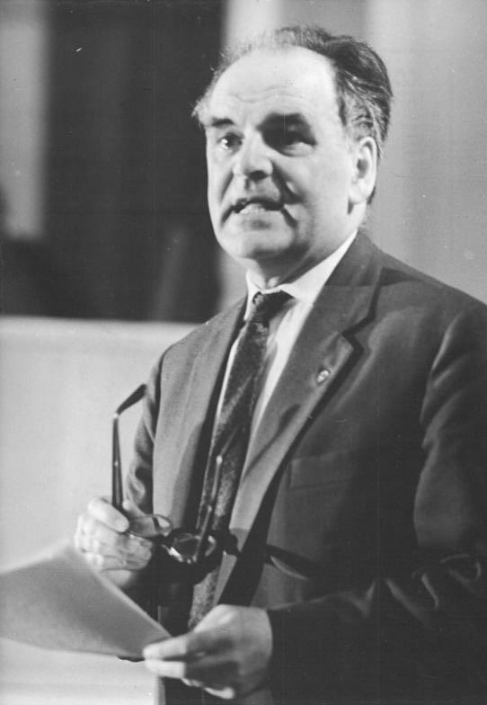 Note: This description has been identified as biased or incorrect: GDR propaganda language. Zentralbild Stöhr-17.7.1963 Prof. Dr. Engelberg über die politischen und ideologischen Wurzeln der nazistischen Verbrechen. Als letzter Gutachter im Globke-Prozeß analysierte Prof. Dr. Ernst Engelberg (unser Bild), Direktor des Historischen Instituts der Deutschen Akademie der Wissenschaften, die politischen und ideologischen Wurzeln der nazistischen Verbrechen. Der Wissenschaftler zog dabei aufschlußreiche Vergleiche zum Adenauer-Globke-Staat der Gegenwart.